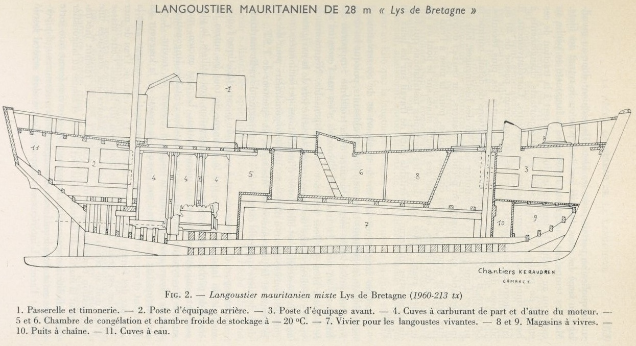 Coupe du langoustier Lys de Bretagne, long de 28 mètres, construit par les chantiers navals Keraudren de Camaret en 1960